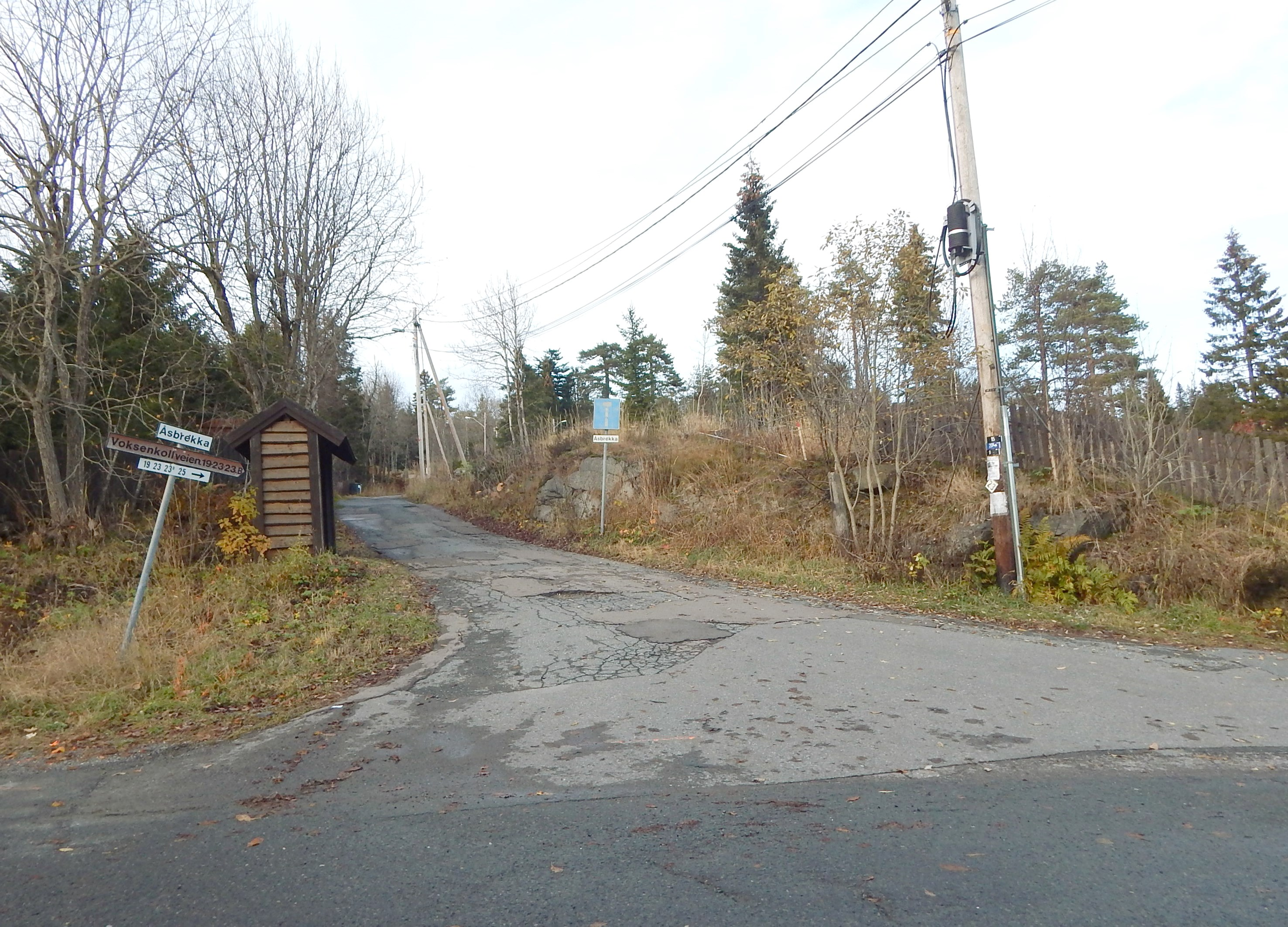 Åsbrekka